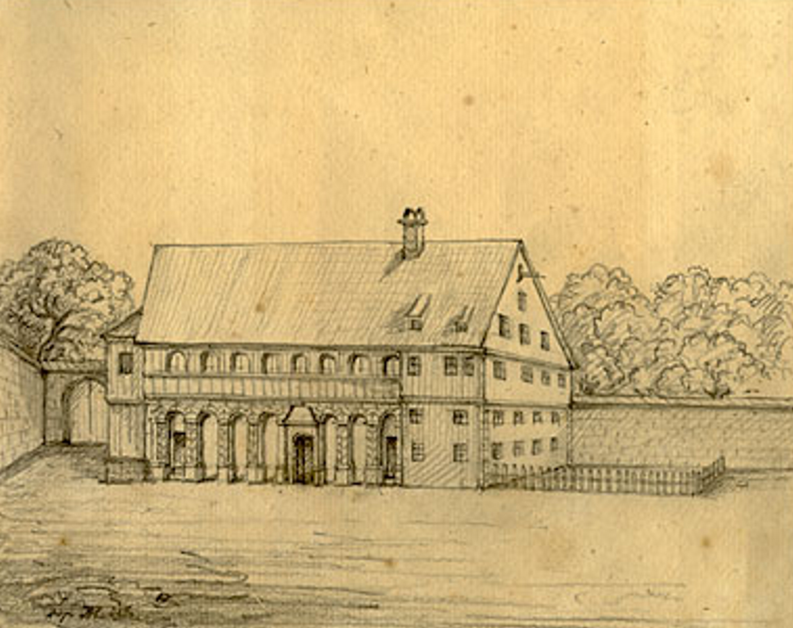 Zeichnung des nicht mehr existenten Ballhauses in Coburg, Deutschland